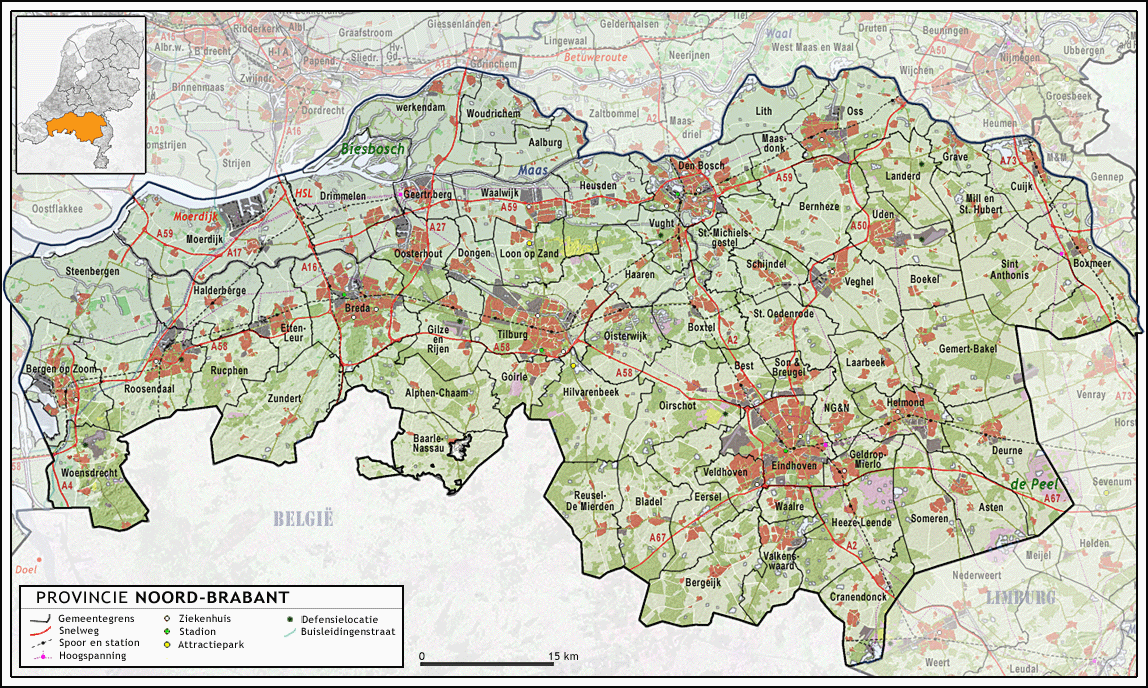 Provincie Noord-Brabant, met indeling van gemeenten (2009) en impressie van het landschap. Door Jan-Willem van Aalst, samengesteld uit publiek beschikbare geo-data: Referentie-ondergrond (kustlijn, steden, wegen) gerasterd uit de OpenStreet Map OSM. ( Inhoud is beschikbaar onder de Creative Commons Attribution-ShareAlike 3.0 license. Referentie-ondergrond op water bewerkt vanuit Gebruik is vrij met bronvermelding NLR en ESA. Vectorgrenzen van gemeenten en regio's vrij ter beschikking gesteld met dank aan cartografen van brandweerregio's Hollands-Midden en IJssel-Vecht; gerasterd in Photoshop. BRZO locaties op basis van de provinciale risicokaart, Defensie locaties op basis van de lijst op Overige kenmerken op de kaart: eigen tekenwerk van Jan-Willem van Aalst, op basis van gerasterde gemeentegrenzen.